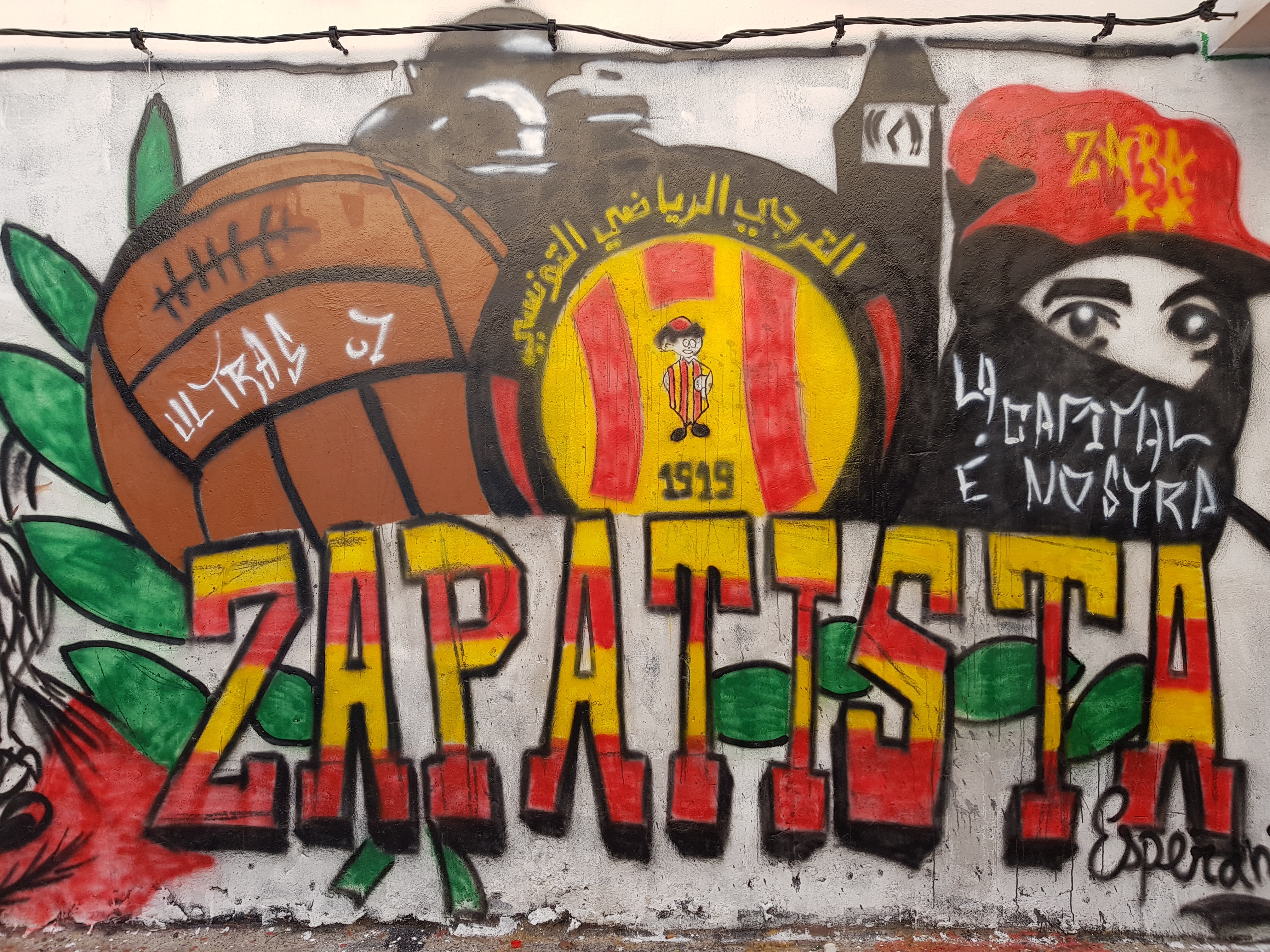 صورة لغرافيتي تحمل شعار مجموعة مشجعي الترجي الرياضي التونسي المعروفة باسم Zappatista